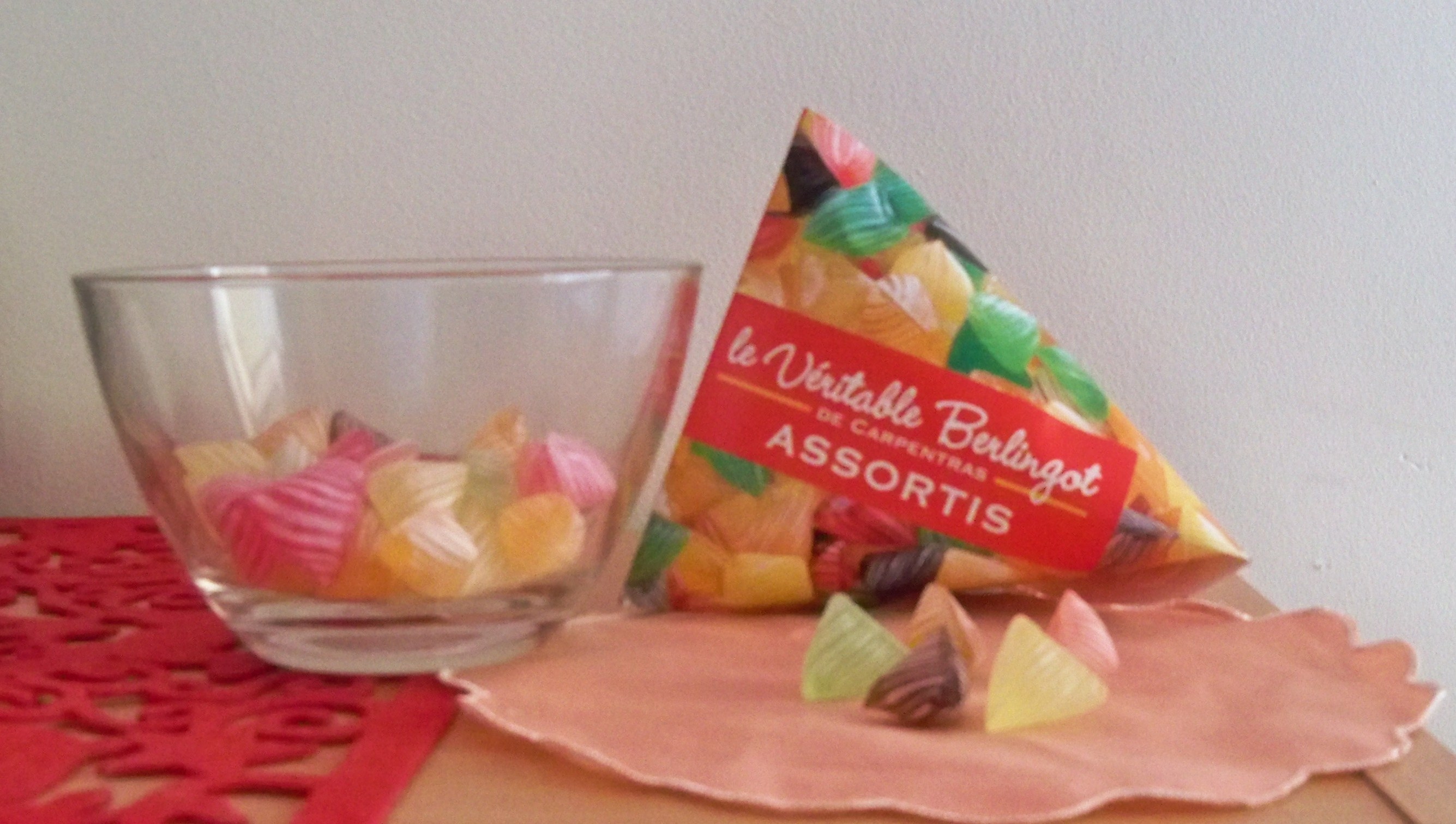 Assortiment de Berlingots de Carpentras, confiserie à base de sirop de fruits confits